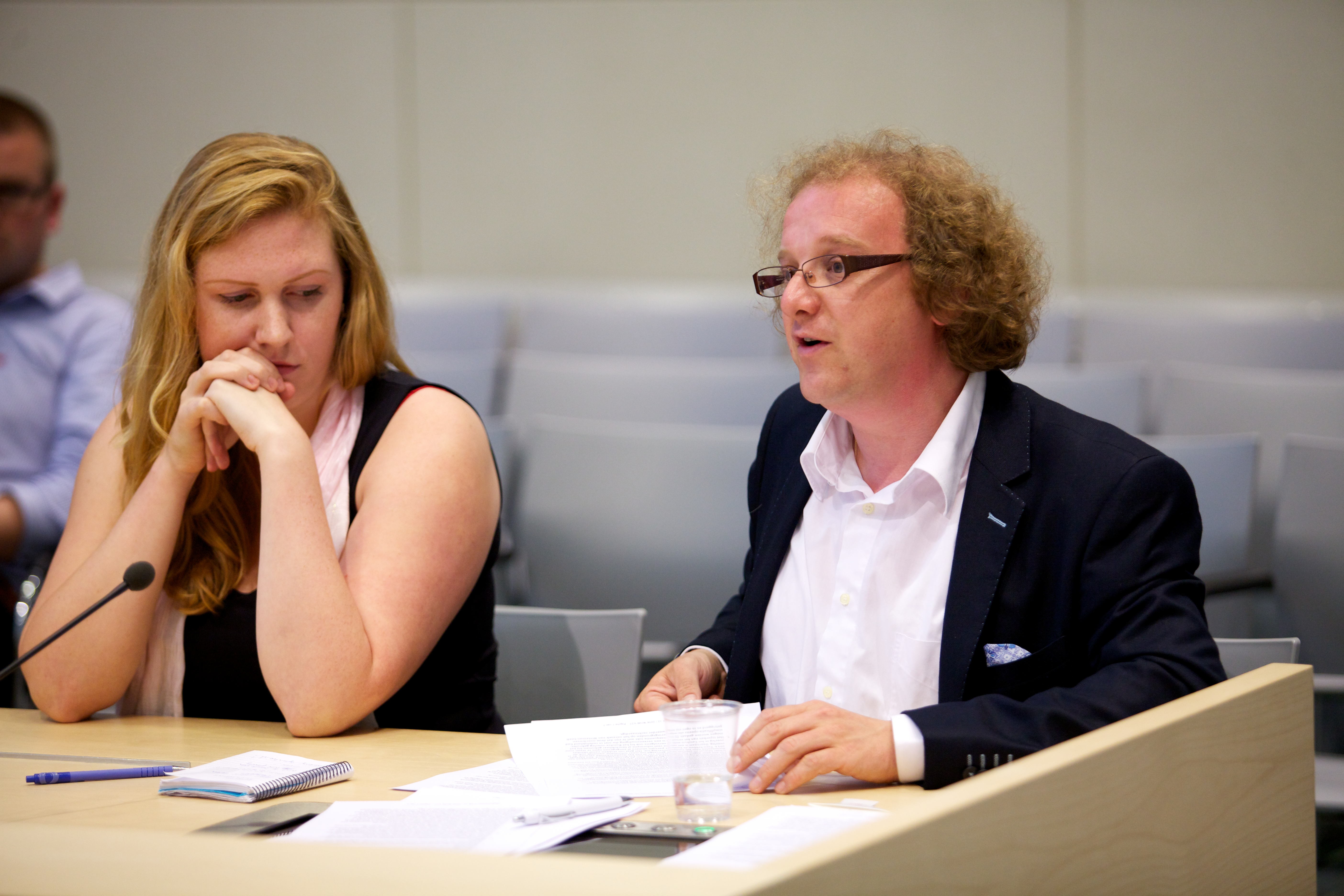 Lise Witteman, politiek verslaggever van NU.nl, heeft een kort geding aangespannen tegen het Ministerie van Financiën omdat ze het niet eens is met de de afhandeling van een Wob verzoek dat ze bij het Ministerie van Financiën heeft gedaan. Lise Witteman werd bijgestaan en vertegenwoordigd door onderzoeksjournalist, collega en wob expert Brenno de Winter. Het Ministerie van Financiën werd vertegenwoordigd door plaatsvervangend landsadvocaat Eric Daalder. Op 30 augustus 2012 volgt de uitspraak.